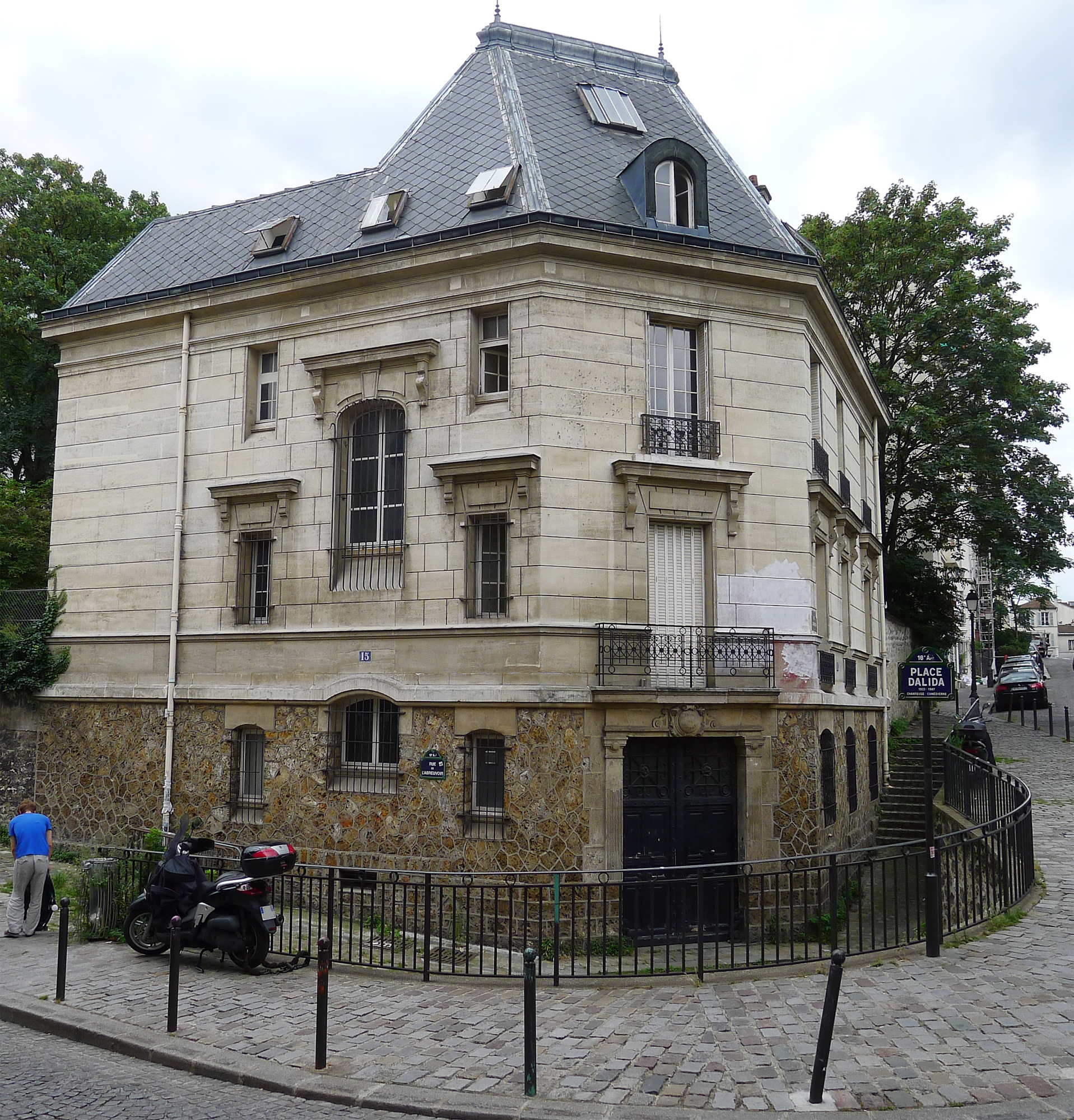 Maison située à l'angle des rues de l'Abreuvoir (n°15) et Girardon (n°16) - Paris XVIIIL'ancien abreuvoir de Montmartre se situait à son emplacement.